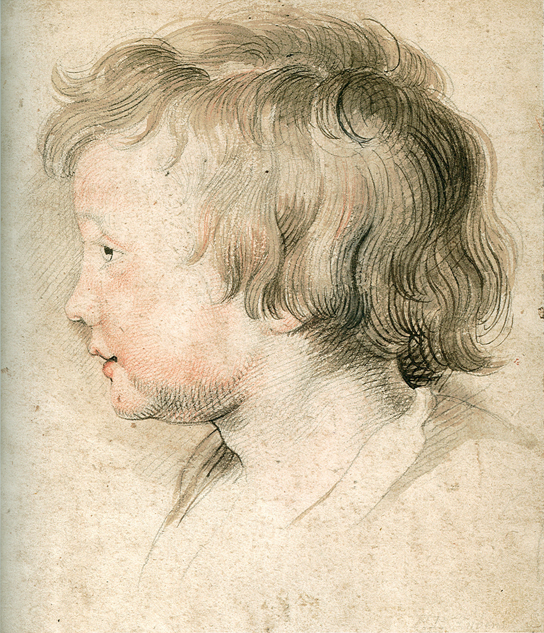 Peter Paul Rubens i syn Nicolas